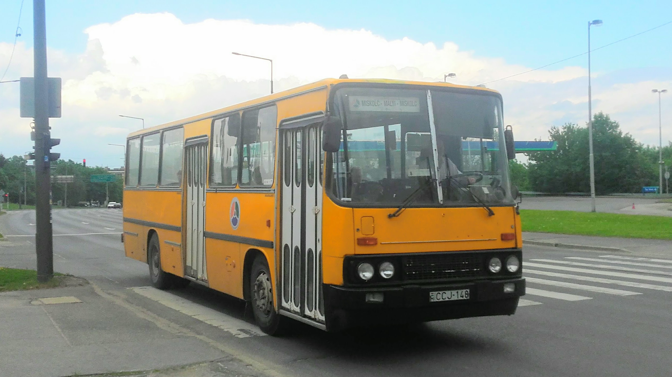 Az ÉMKK CCJ-148 rendszámú Ikarus 260 típusú busza Miskolcon, a 3740-es helyközi járaton.